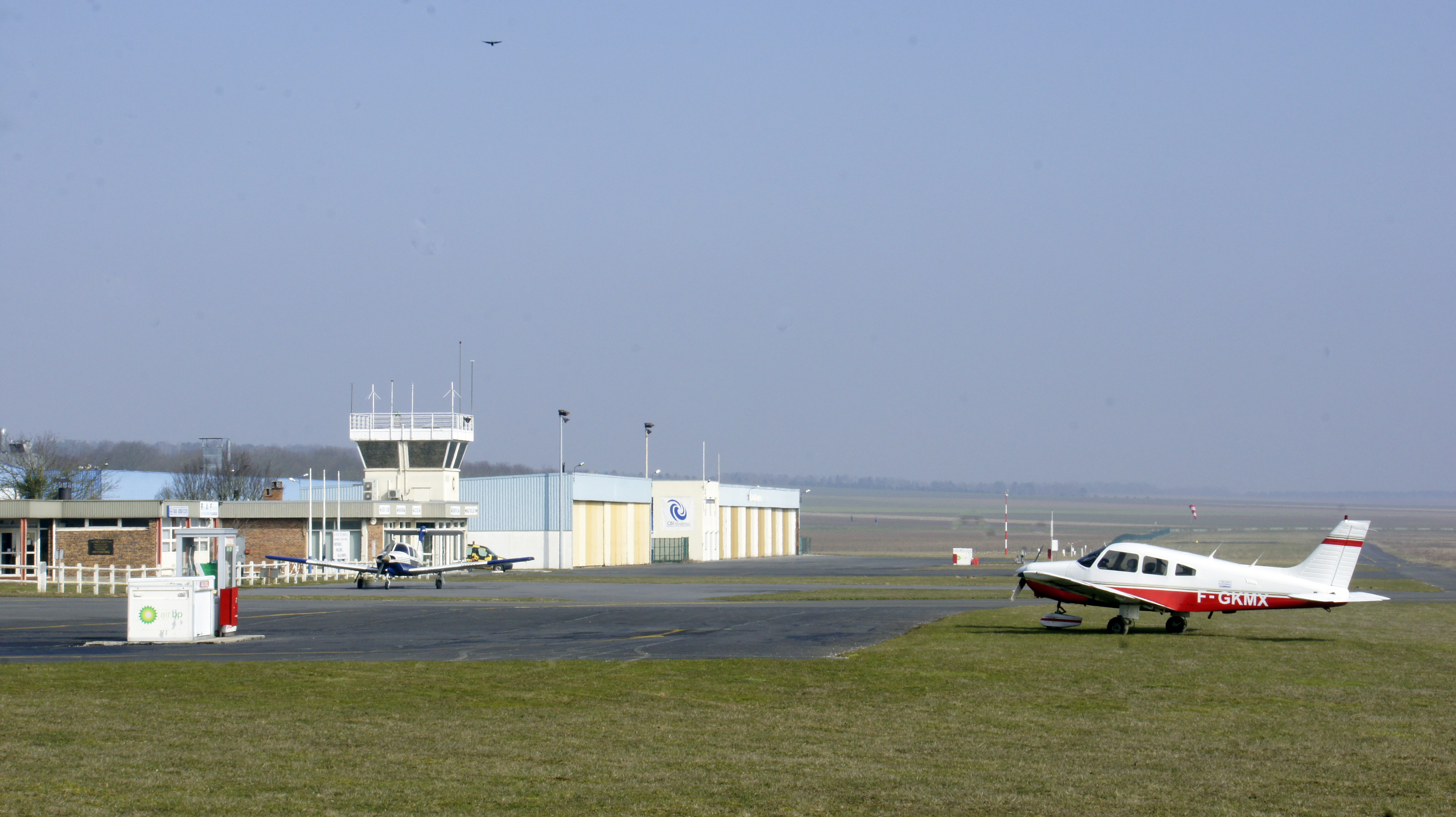 Piste; station de carburant et tour de controle de Reims Prunay .